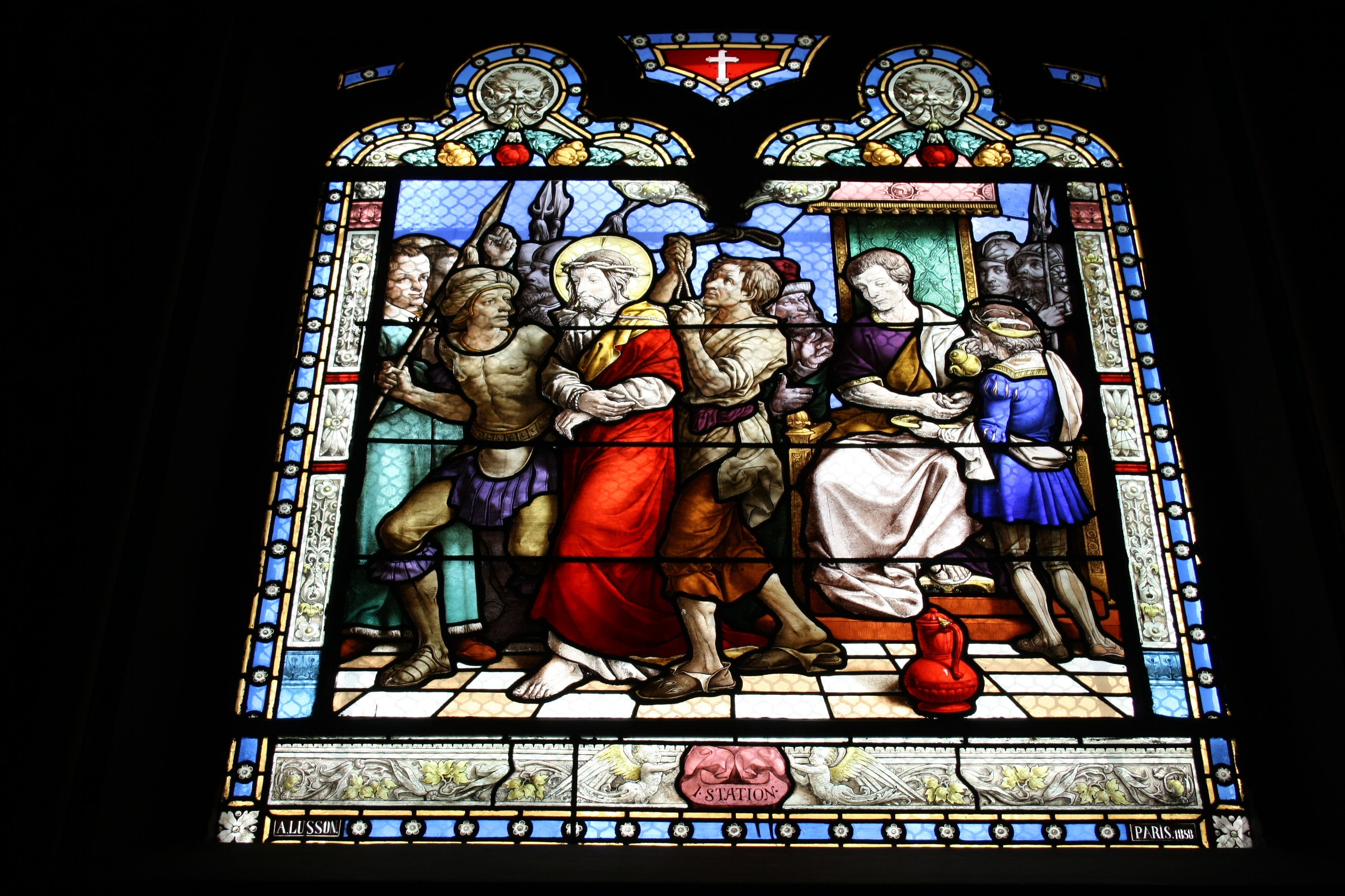 Katholische Pfarrkirche St-Eugène-Ste-Cécile im 9. Arrondissement von Paris, Bleiglasfenster mit der Darstellung der I. Station des Kreuzwegs: Verurteilung Jesu und Pontius Pilatus, der sich die Hände wäscht, Karton von Jean Alfred Gérard-Séguin, Signatur: „A. LUSSON PARIS 1858“